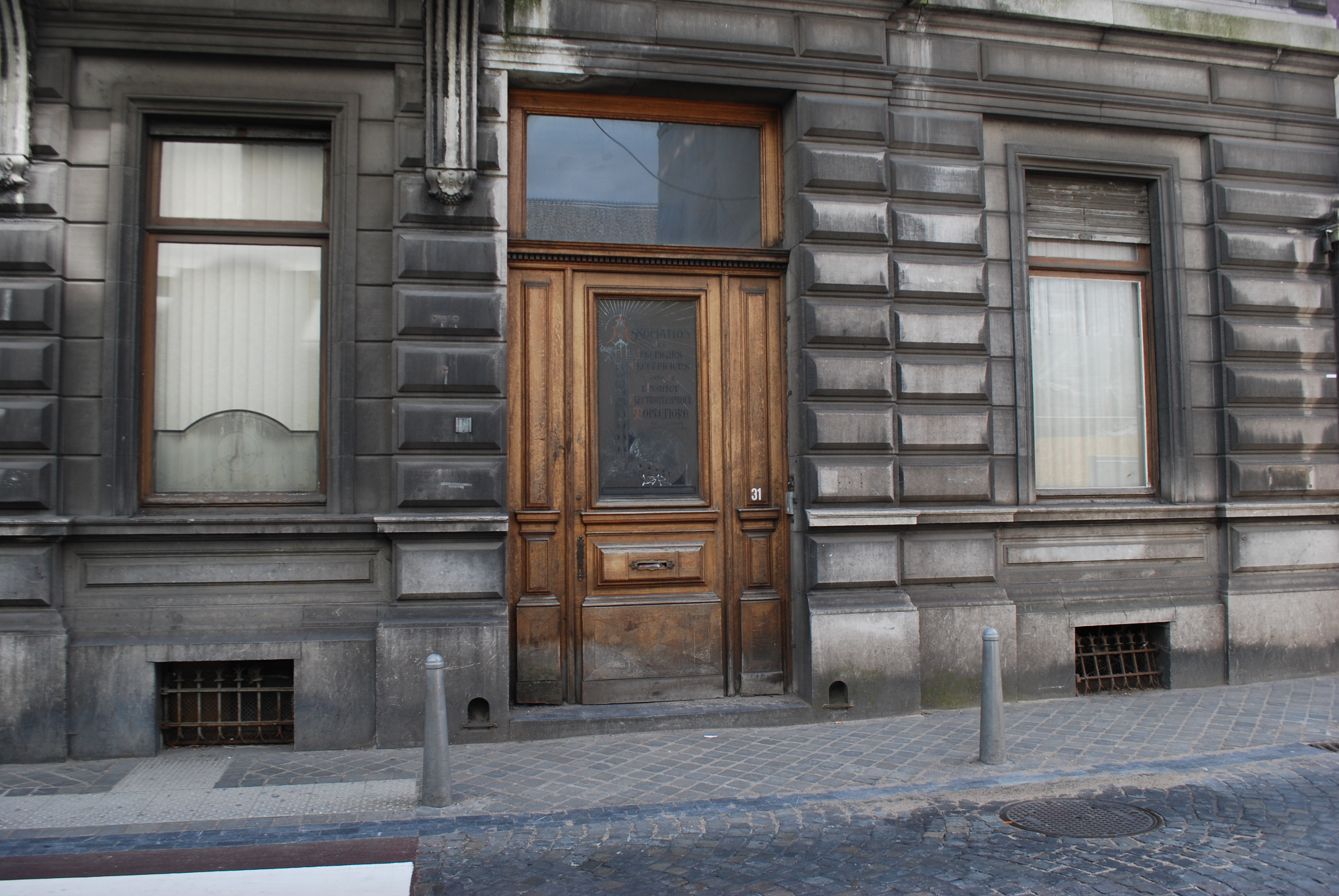 Vue du quartier Saint-Gilles à Liège.